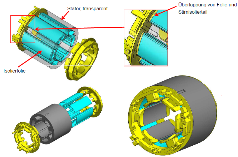 Papierisolierter Vollblechschnittstator